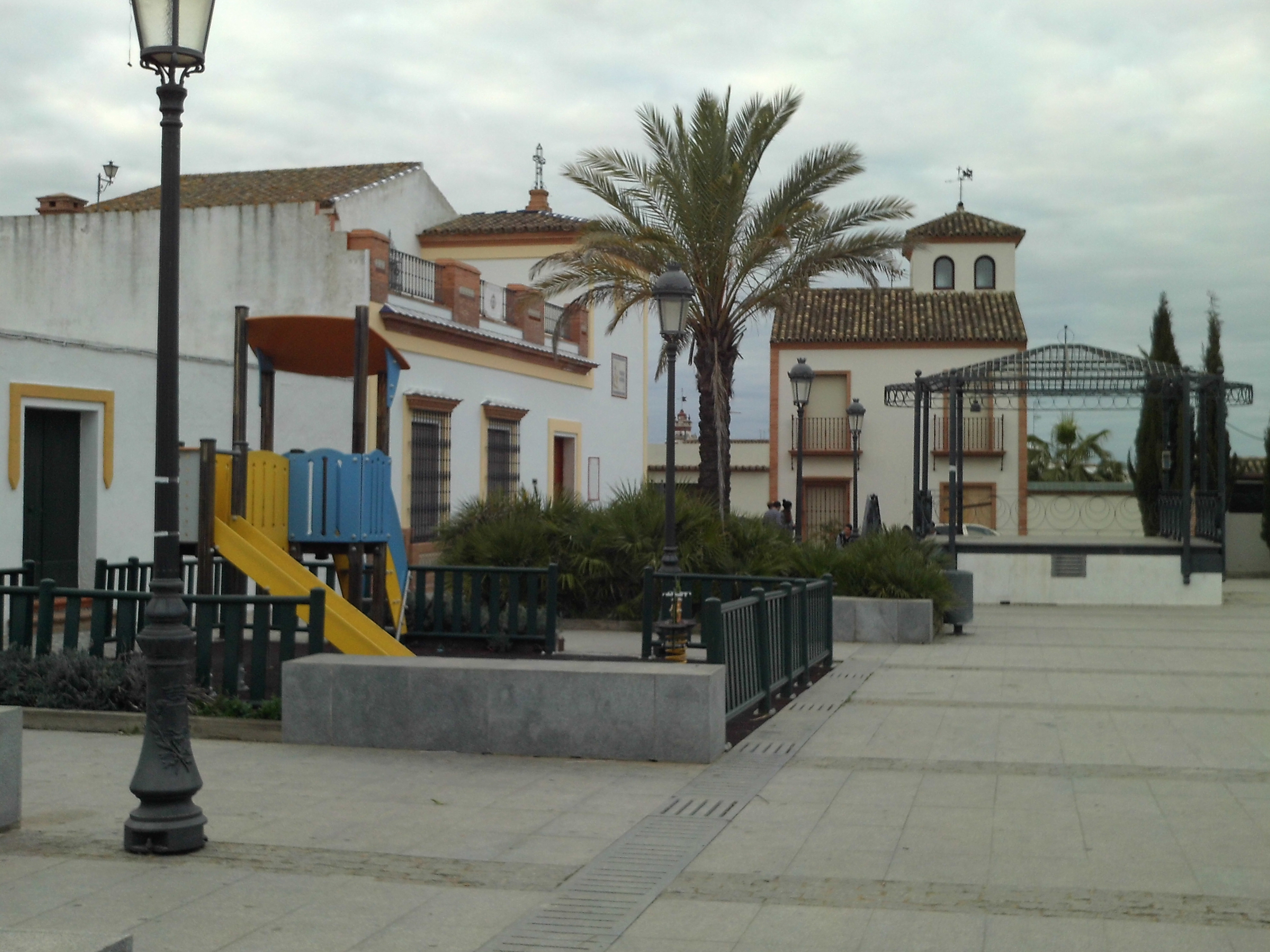 Plaza del Sacramento. Villanueva del Ariscal, provincia de Sevilla, Andalucía, España.